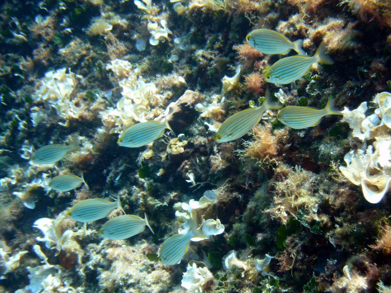 Sarpa salpa, Croatia